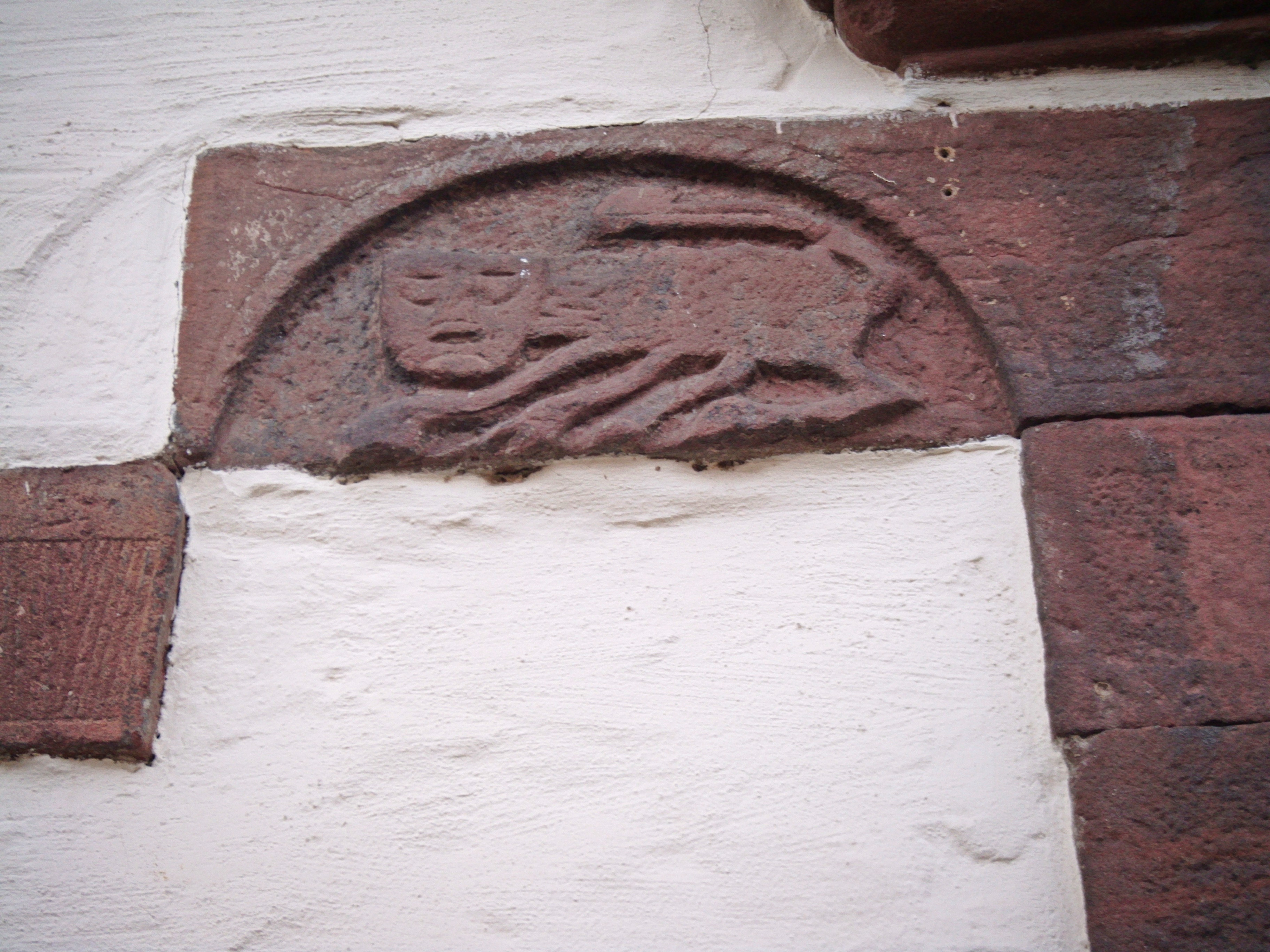 Albsheim an der Eis (Obrigheim), Protestantische Kirche, romanischer Rundbogenfries mit Tierfigur (Katze), Sakristei